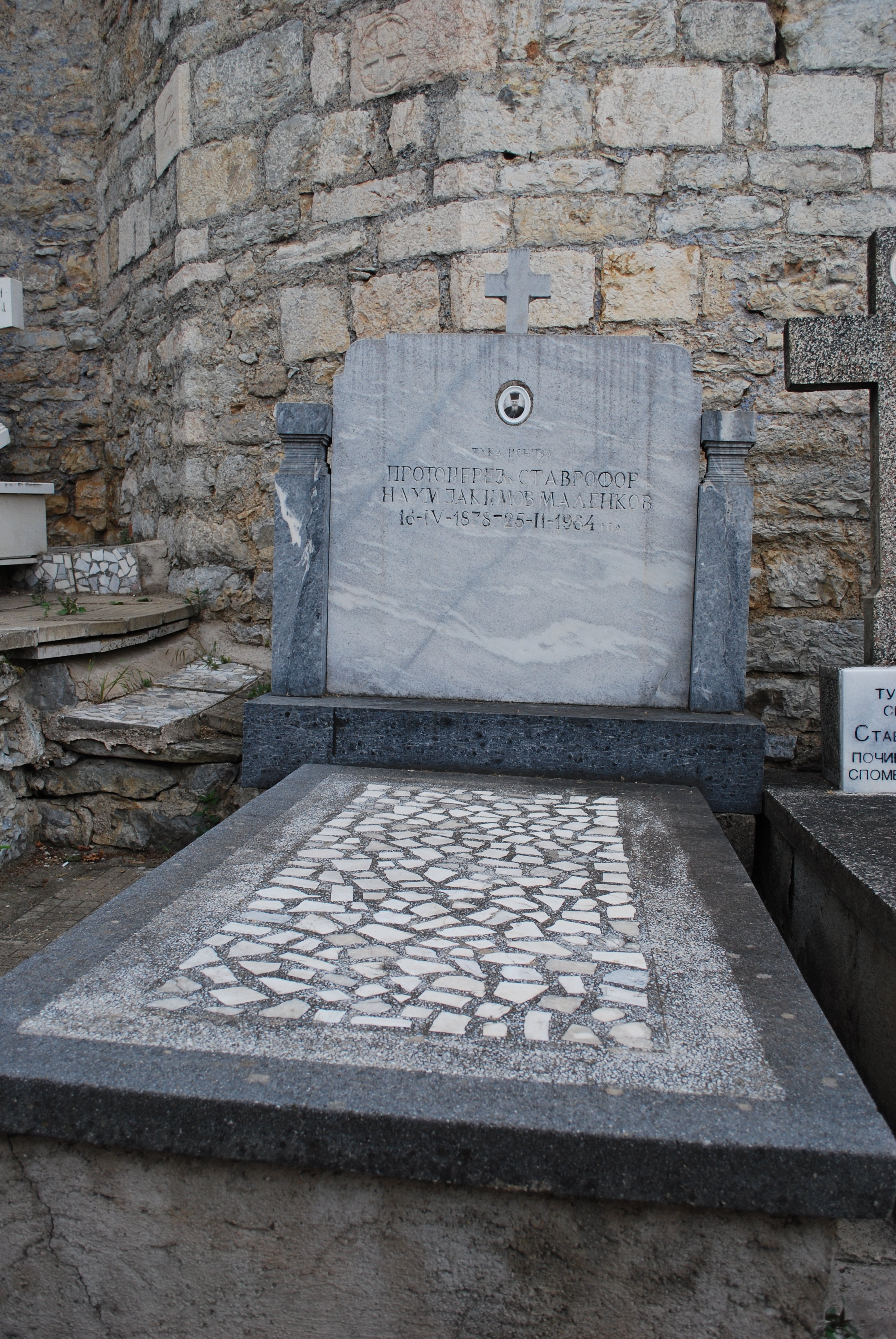 Гроб во Црквата „Св. Богородица“ Каменско во Охрид. Македонија